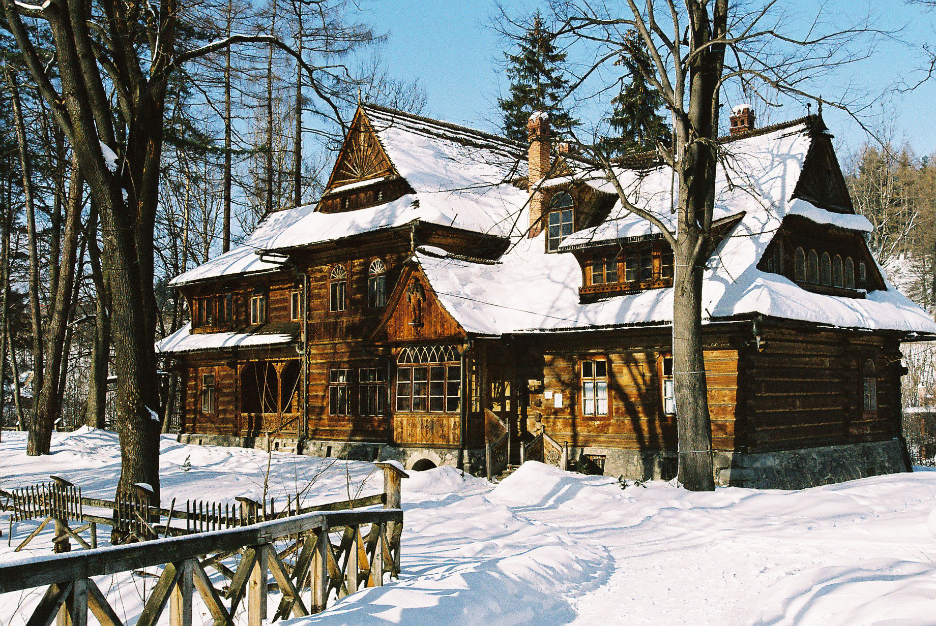 Willa Koliba w Zakopanem